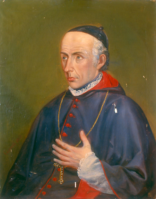 Alessandro Ciccarelli. 1862. Retrato del obispo Manuel Vicuña Larraín. Óleo sobre tela. 77 x 61 cm. Colección Pintura y Estampas. N° Registro 03.146. El Catálogo del Coloniaje dice que “fue un varón justo. Desde la niñez mostró su humildad, su virtud y su dulzura. Infatigable misionero, restauró la abandonada iglesia de la Compañía (1816) e invirtió todo su patrimonio en la construcción de la casa de ejercicios de San José, que ocupa una manzana completa (1821). De simple clérigo pasó a ser obispo (1830), y diez años más tarde fue promovido al arzobispado, siendo el primer prelado de la arquidiócesis. Falleció en Valparaíso el 3 de mayo de 1843”. La obra fue donada al Museo Histórico Nacional por Luis Surieta Cañas en 1949.